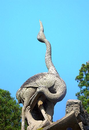 佐久間家墓石上の鶴（二羽）石彫刻 小松寅吉制作。福島県白河市・神宮寺。